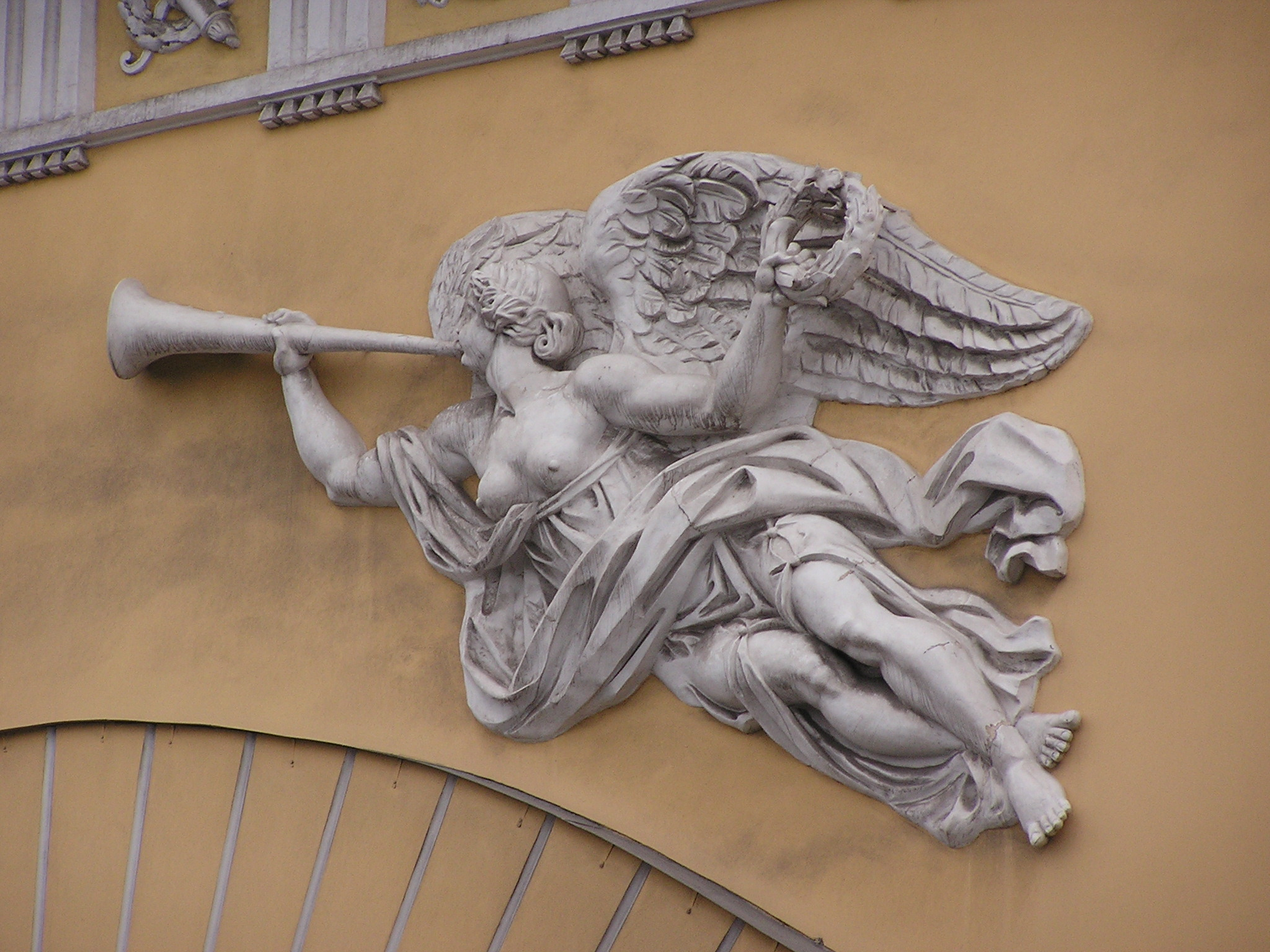 Гений Славы трубящий победу на арке Адмиралтейства. Скульптор: Иван Иванович Теребенев